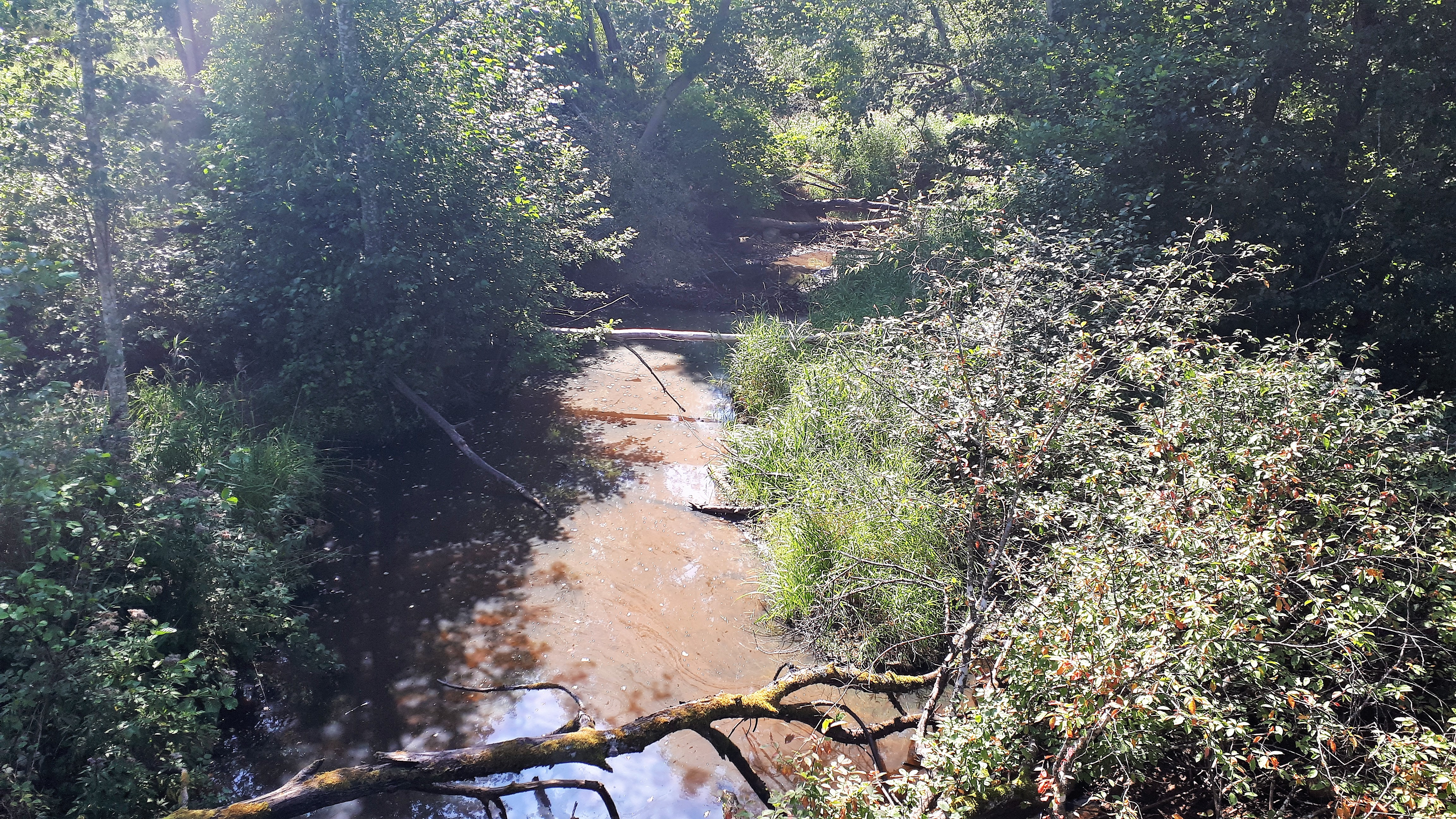 Netālu no ietekas Bārtā.